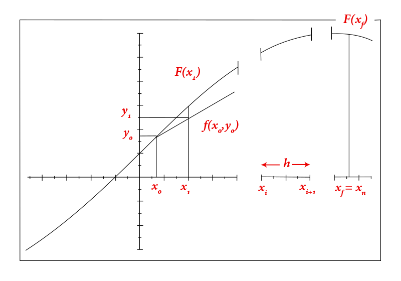 Grafico de Metodo de Euler